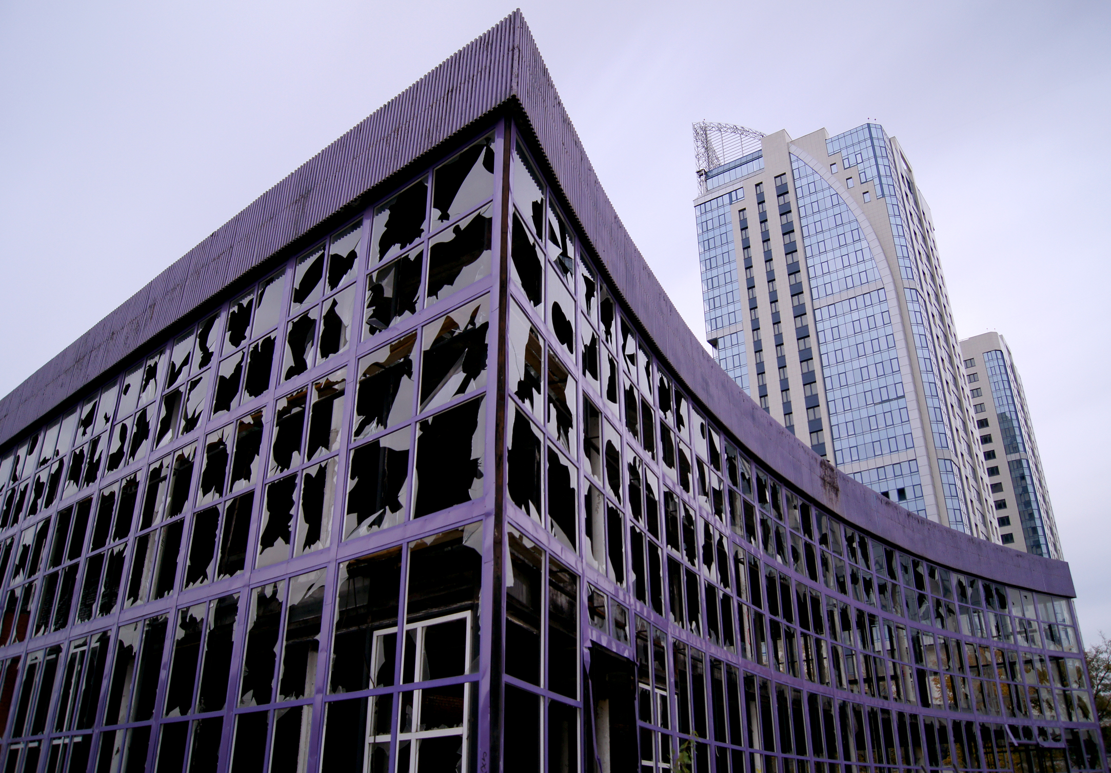 Выбитые окна на фасаде заброшенного кинотеатра "Планета". Санкт-Петербург, Россия. Октябрь 2011 года.